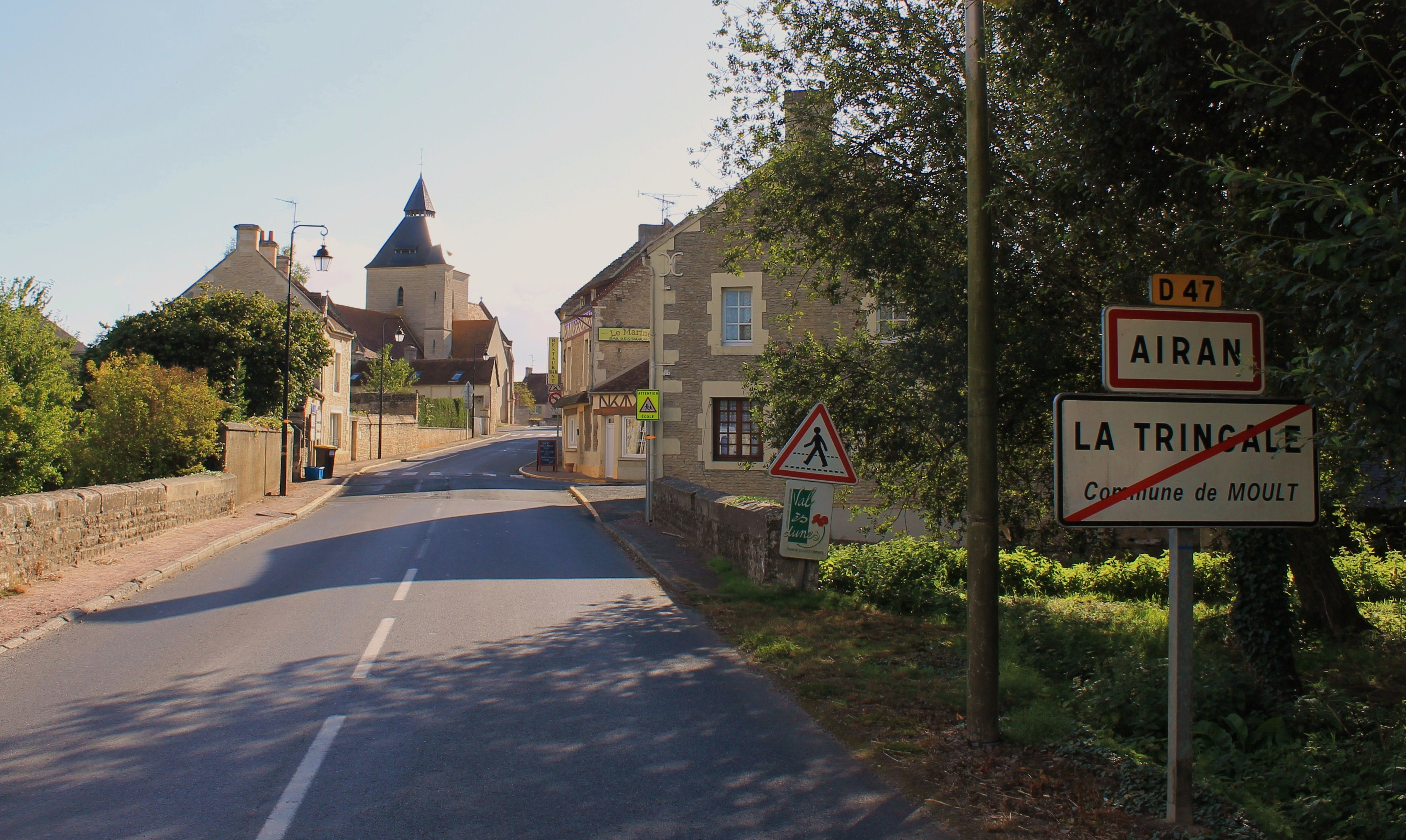 Airan (Calvados)